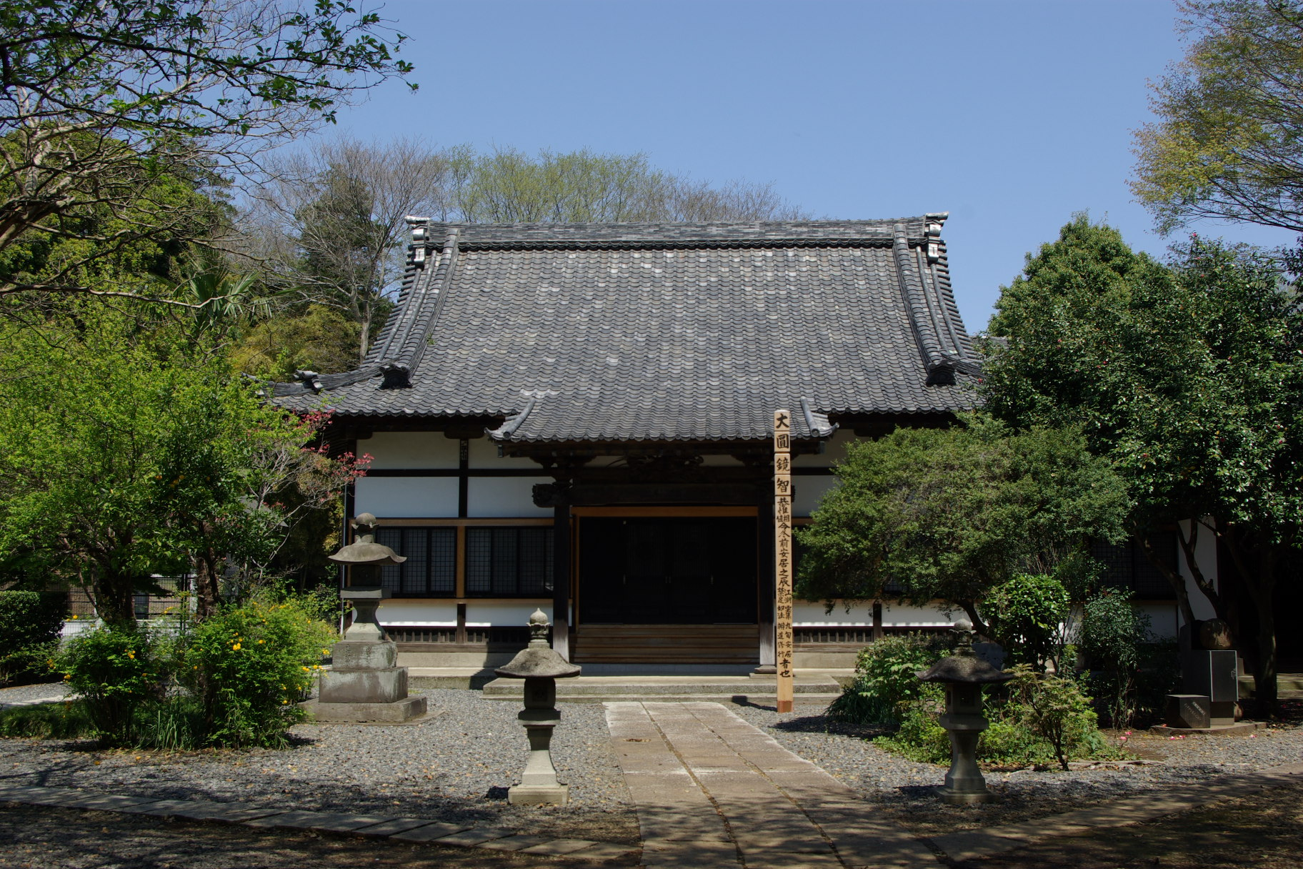 総寧寺（市川市）